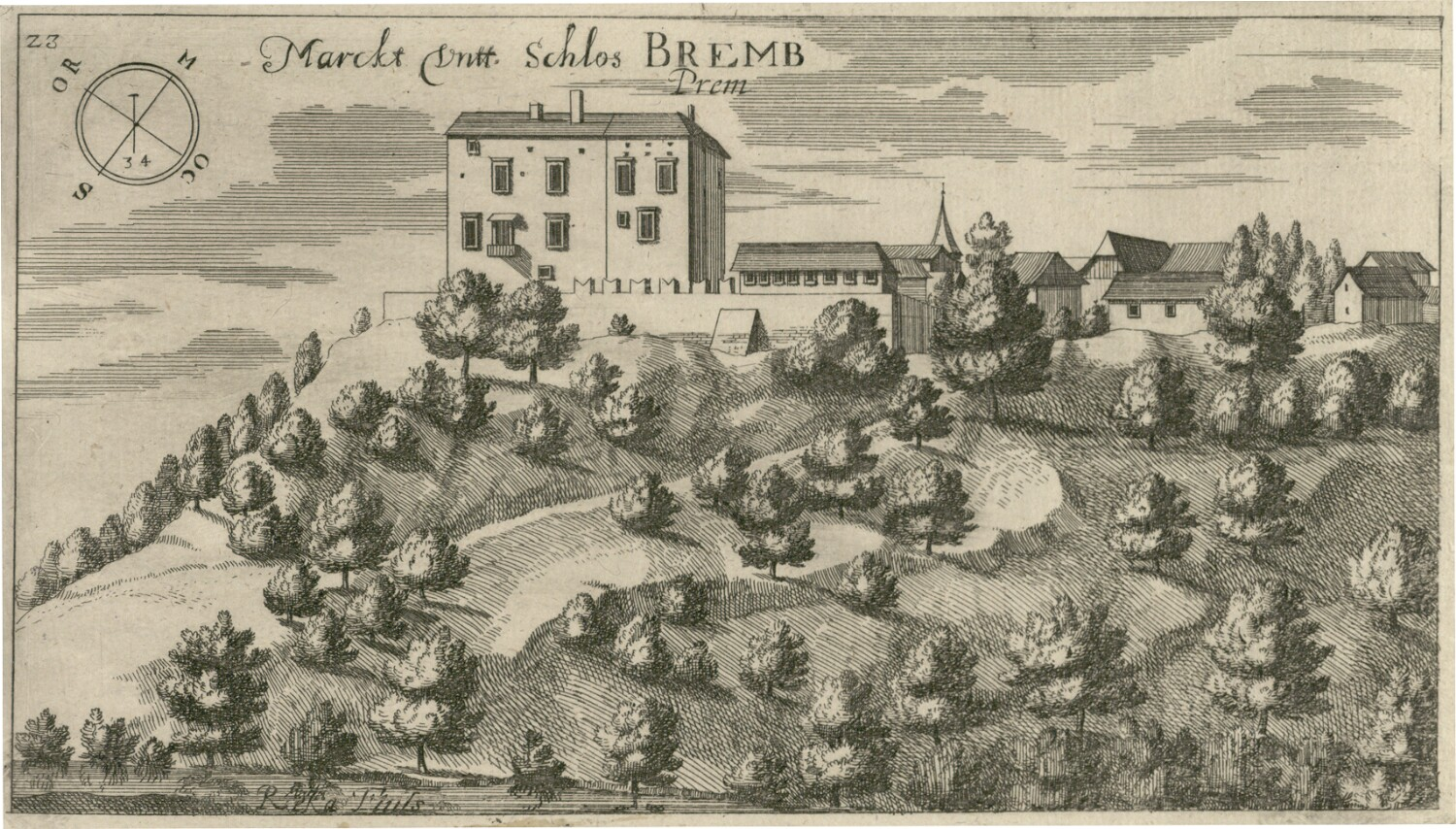 Dvorec in mesto Prem